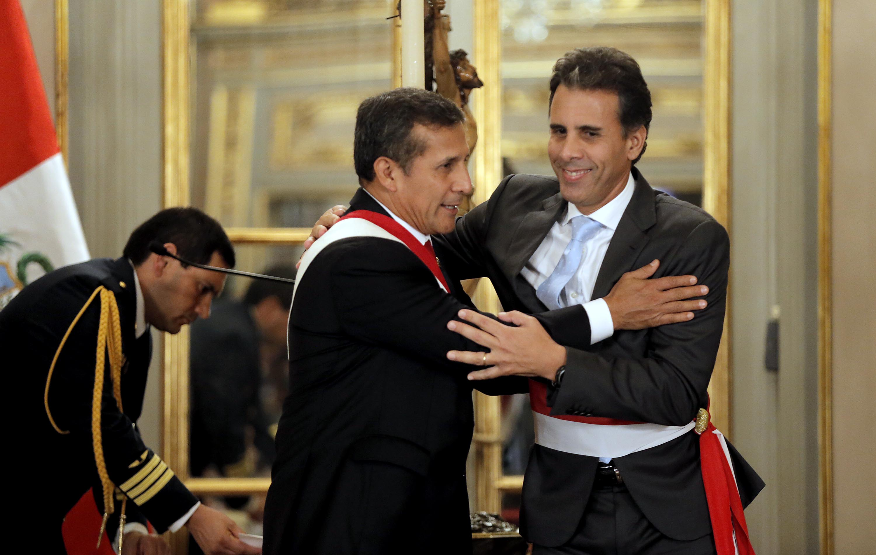 El presidente del Perú Ollanta Humala y el ministro de la Producción, Piero Ghezzi, en la ceremonia de juramentación del Gabinete Cateriano, el 2 de abril de 2015.